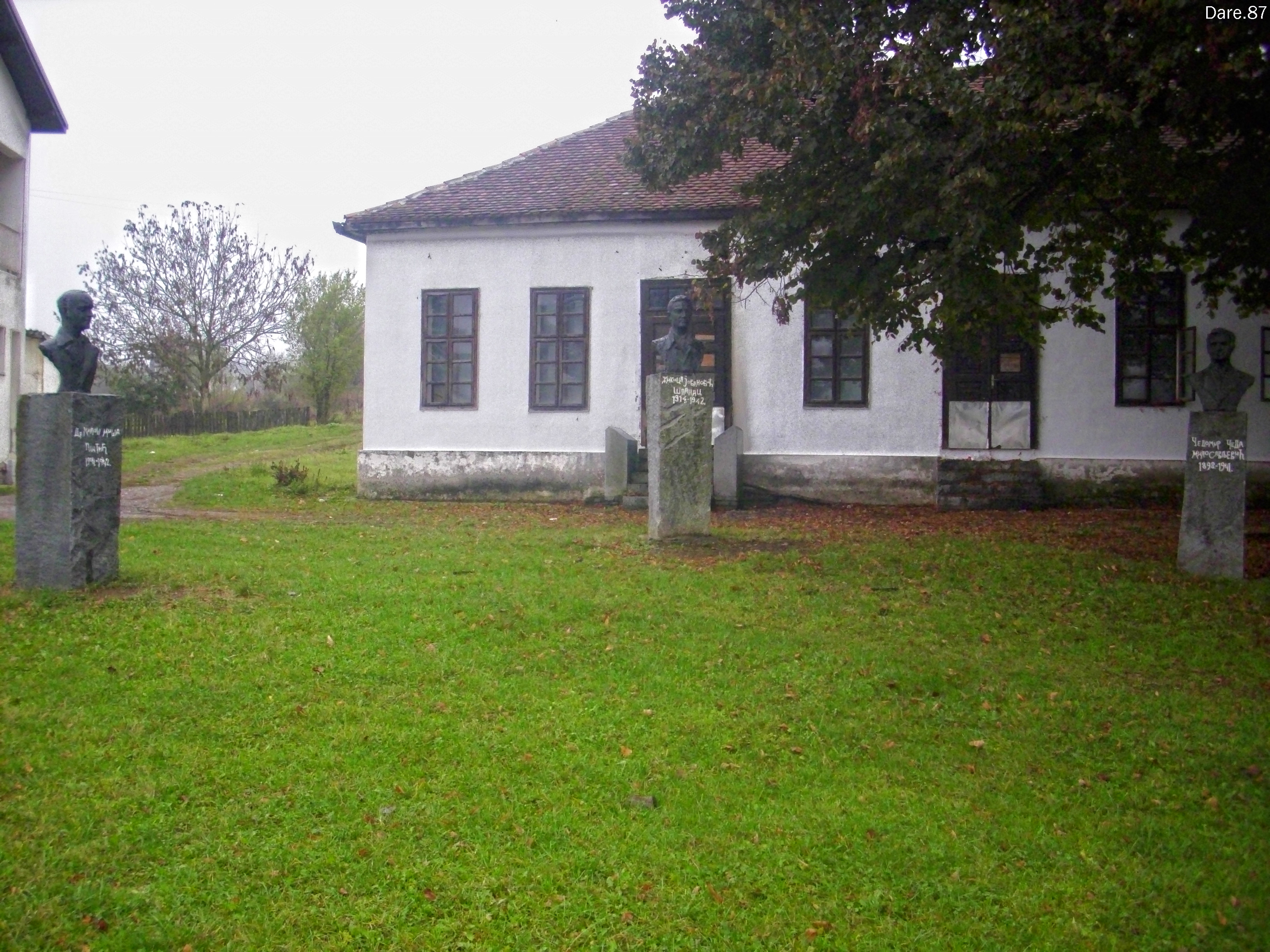 Mesto početka ustanka u Srbiji.